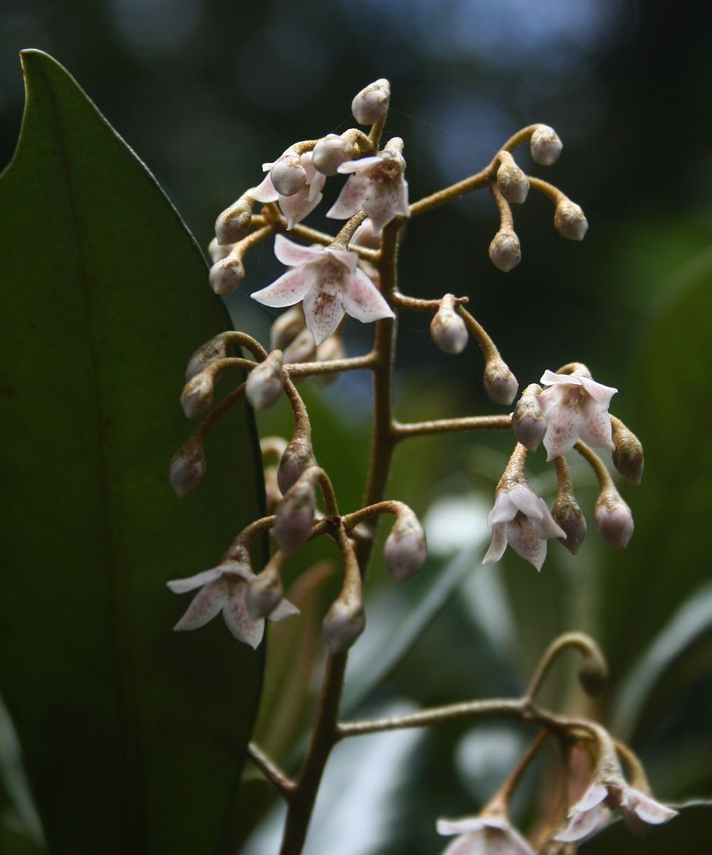 Ardisia pleurobotrya, Primelgewächse (Primulaceae), Myrsinoideae - Costa Rica: Prov. Alajuela, Parque Nacional Volcán Poás, 2550-2600 m